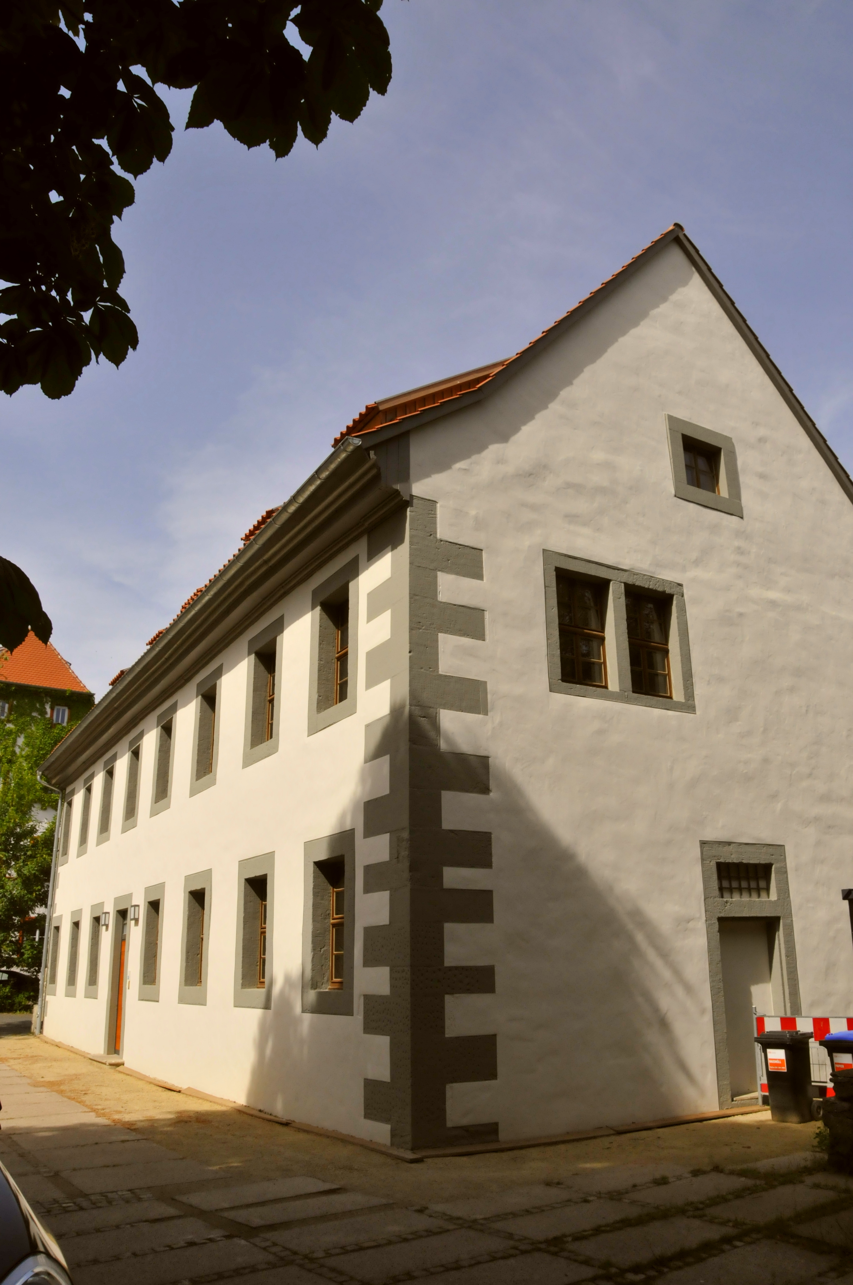 Erfurt, Georgenburse